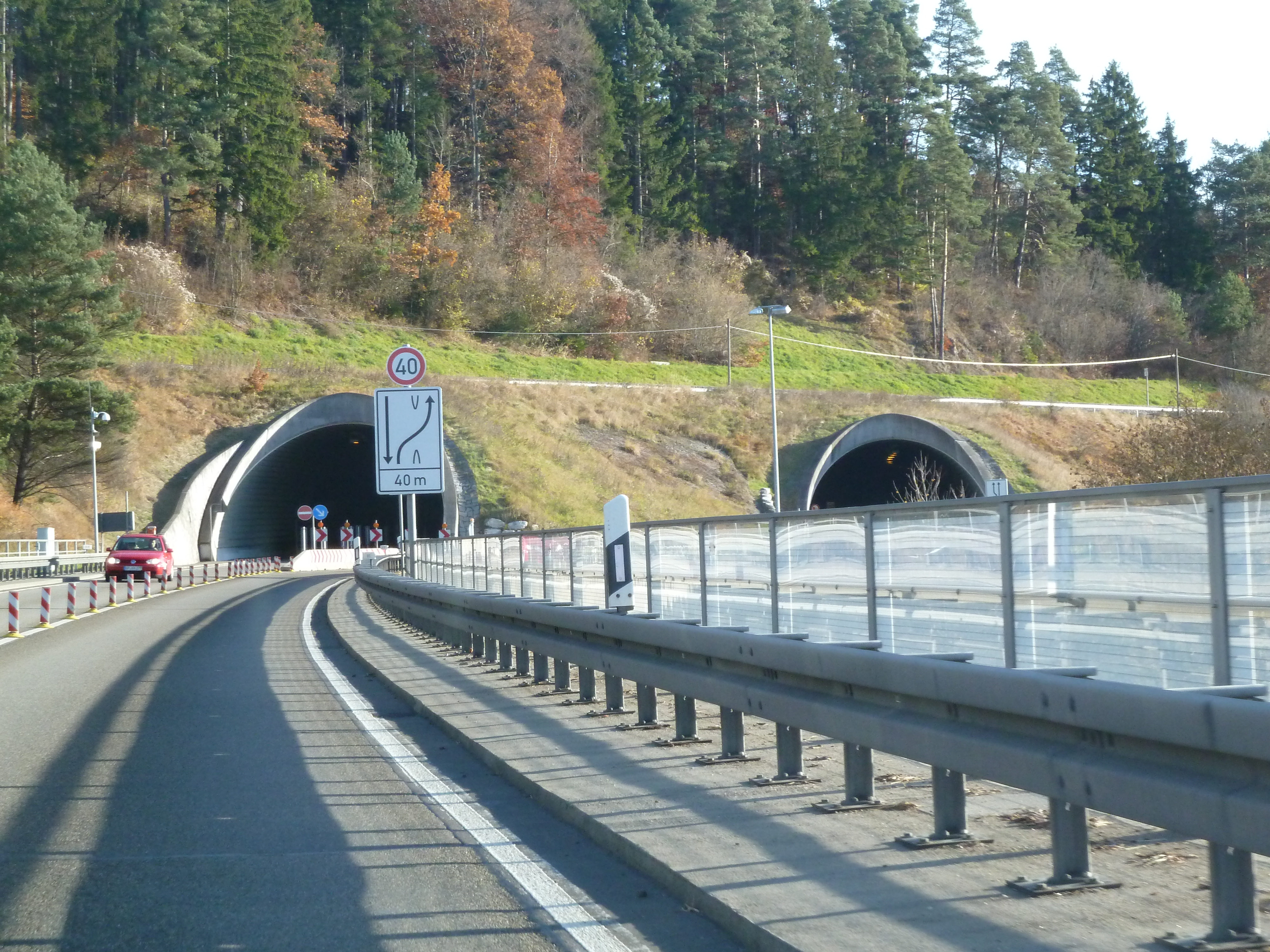 Westportal des Tunnels Döggingen und Teile der Gauchaltalbrücke